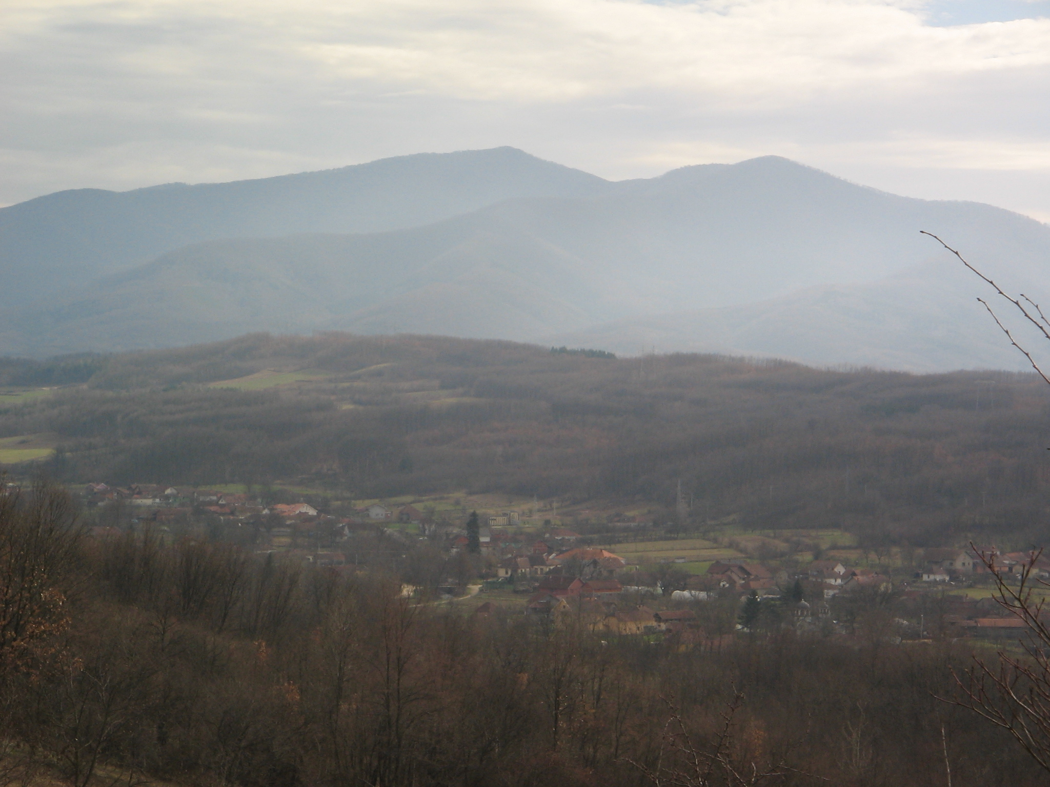 Крушевачко село Модрица са планином Јастребац у залеђу; Фотографија са брда изнад Модрице